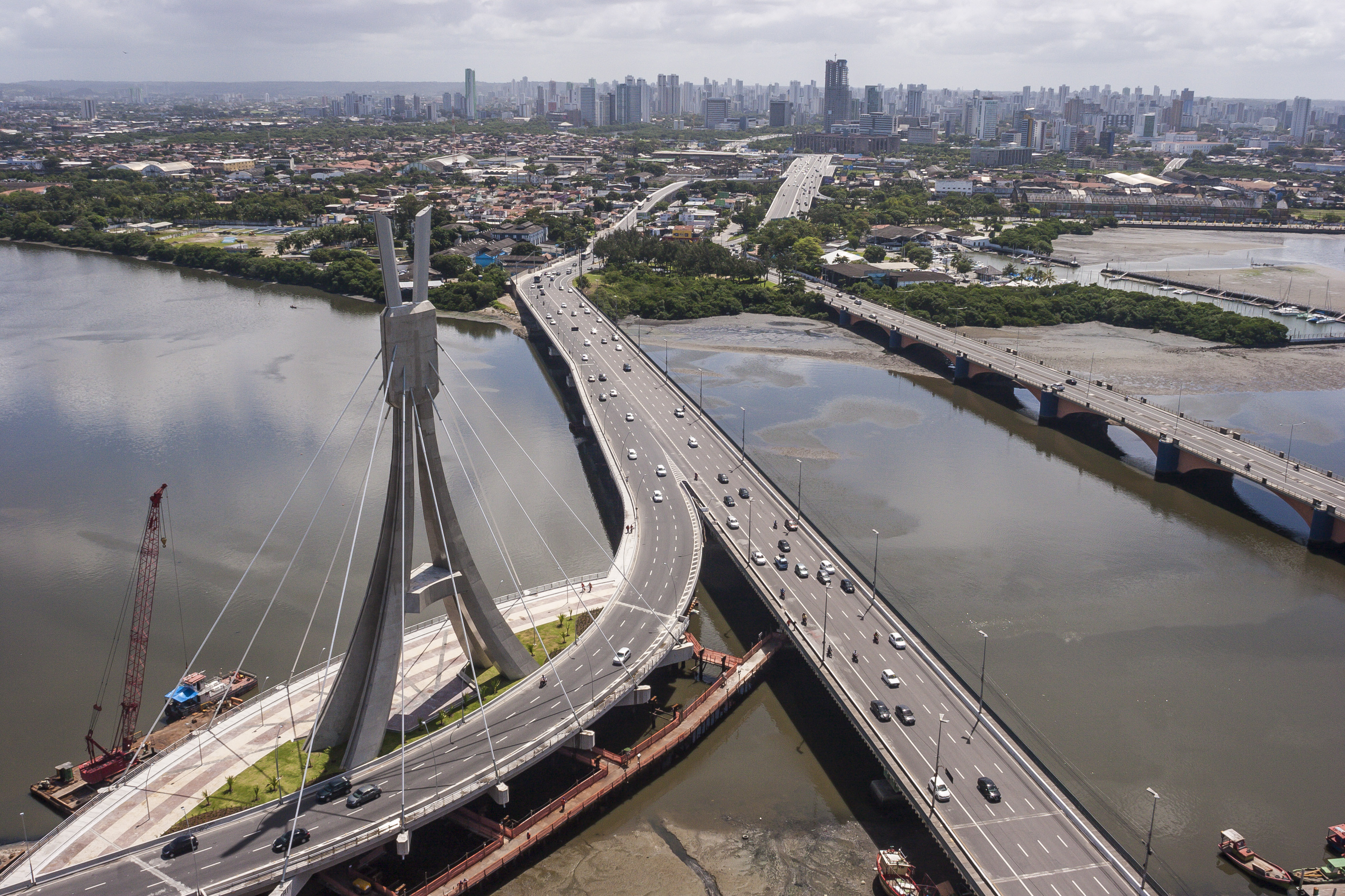 Ponte estaiada da Via Mangue - Recife, Pernambuco, Brasil